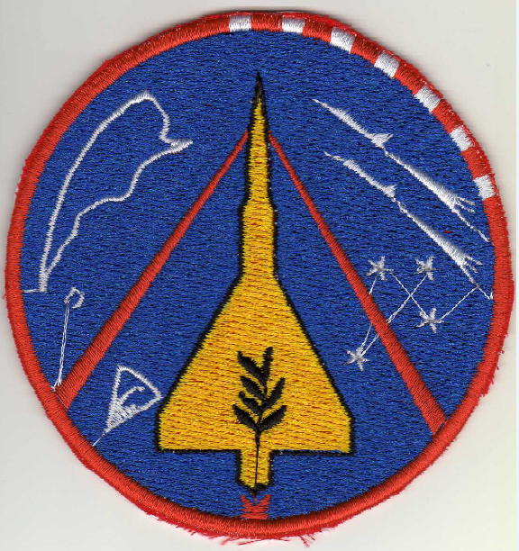 Emblema del Grupo 8 de Caza, VIII Brigada Aérea, Fuerza Aérea Argentina (FAA).